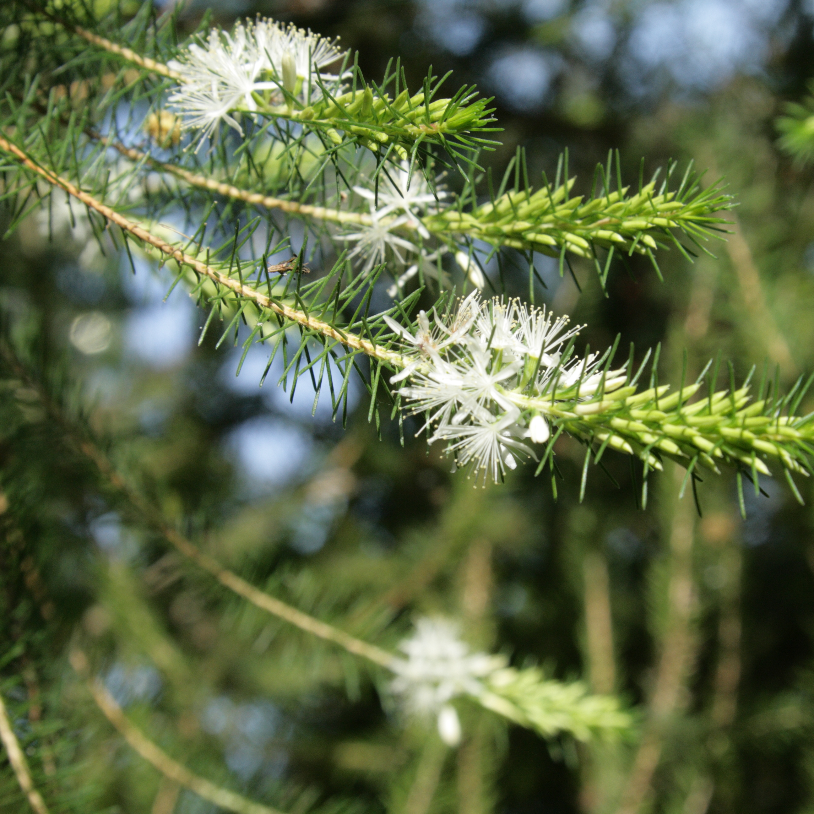 Calytrix acutifolia i Bergianska trädgården.